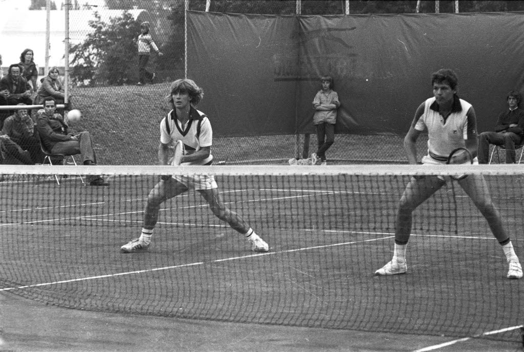 auf der Anlage des 1. Kieler Hockey- und Tennis-Clubs am Kopperpahler Teich 27. Im Bild die Tennisspieler Klaus Eberhard (links) und Reinhart Probst (rechts).